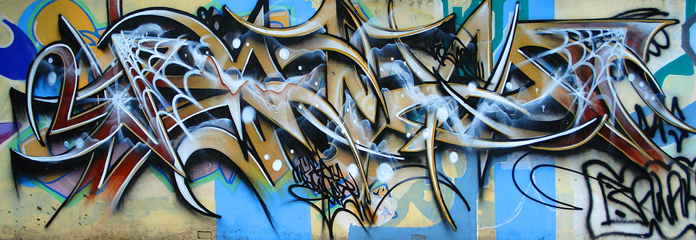 Graffiti anônimo em Porto Alegre, Brasil.